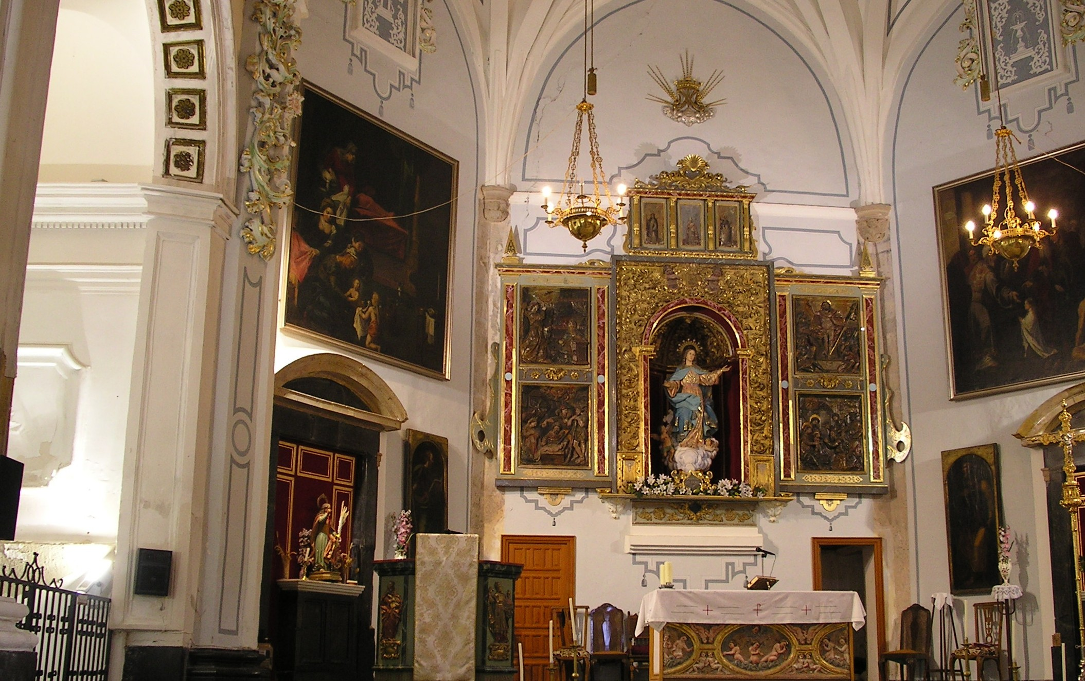 Retablo de la iglesia de la Asunción en Andilla, Valencia, España